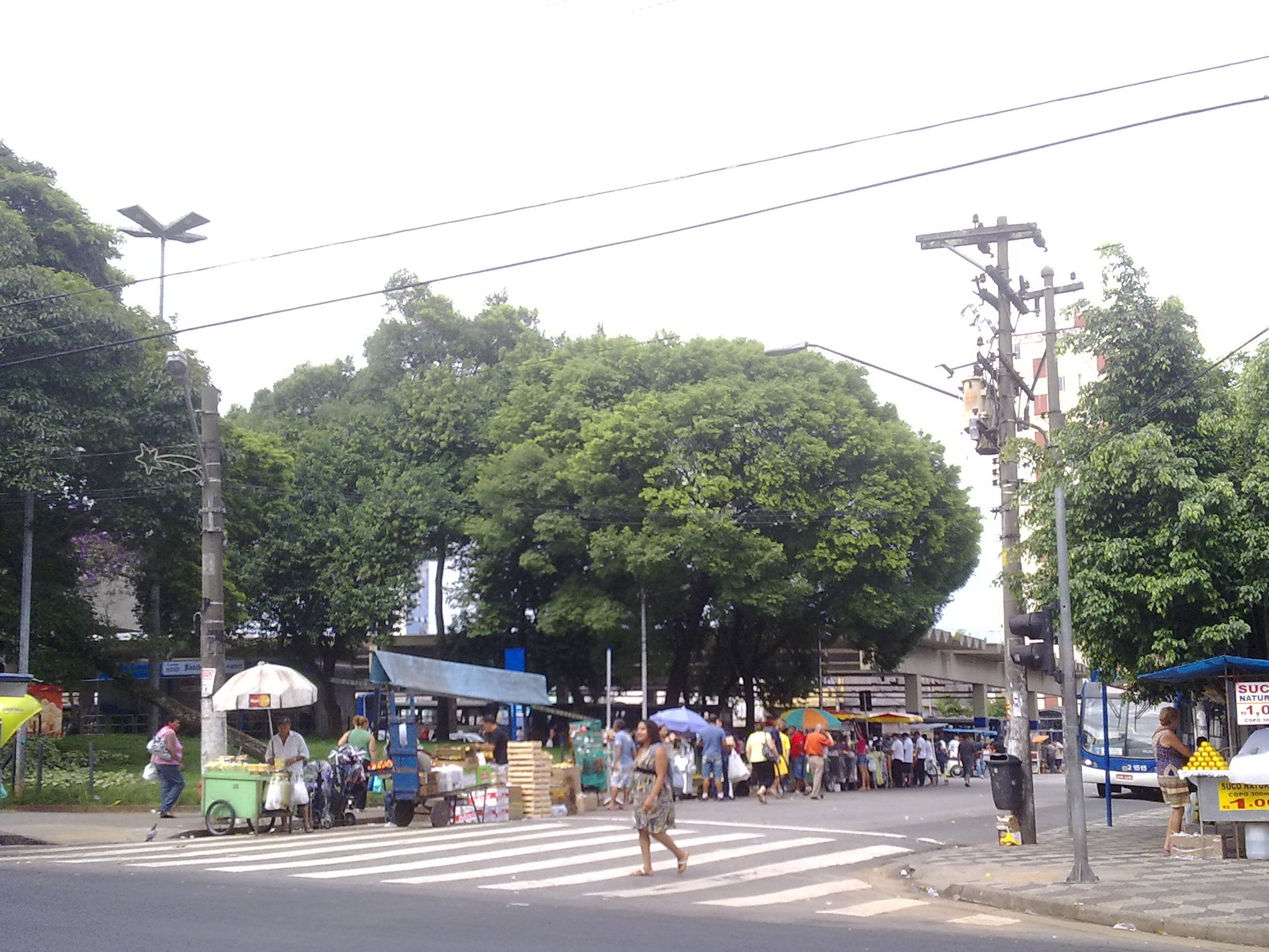 Foto do terminal Santana, localizado na zona norte paulistana.